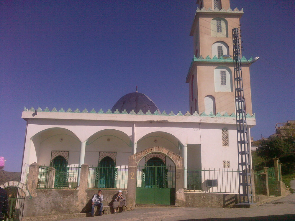 centre du village